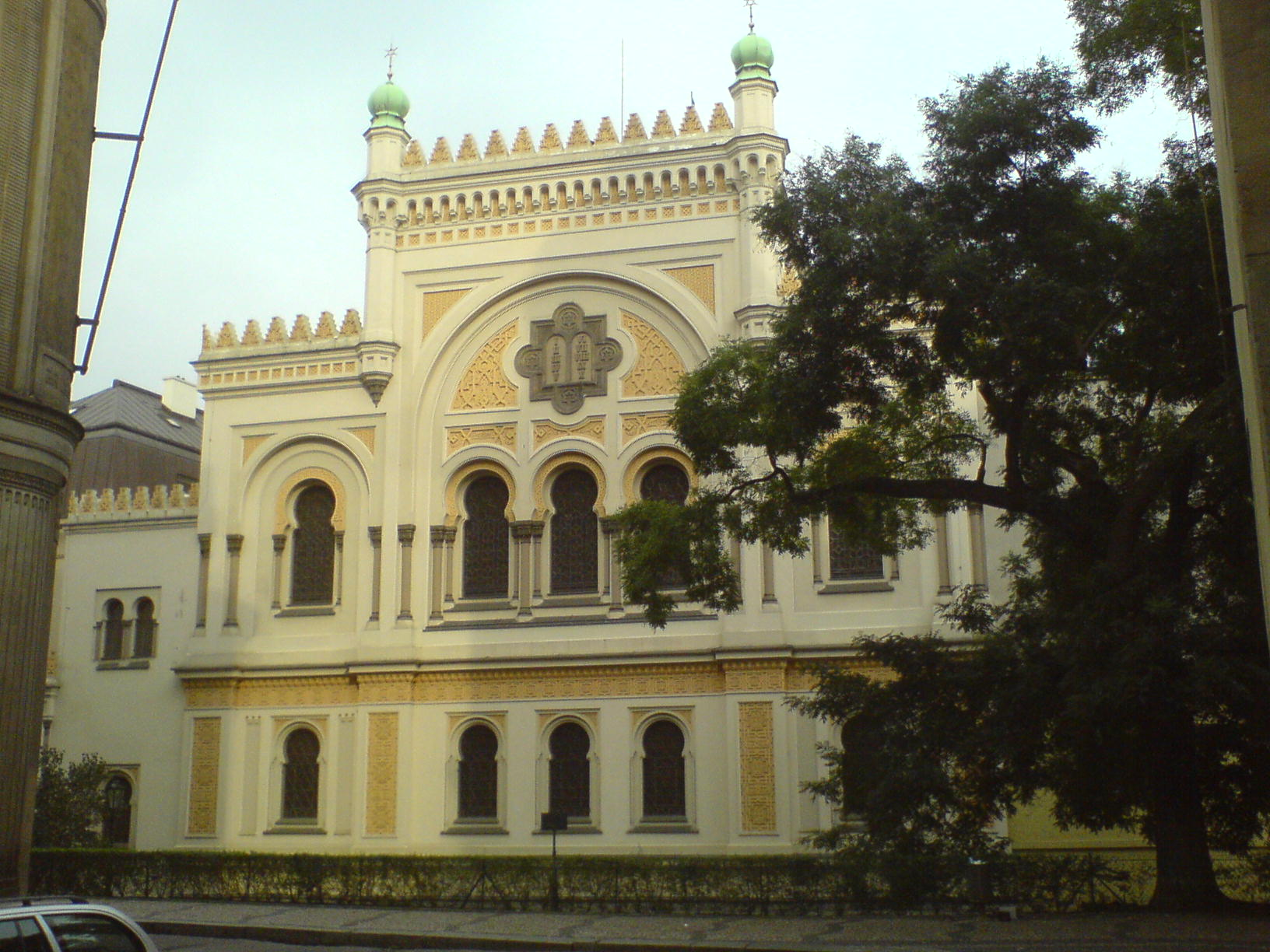 Španělská synagoga v Praze (Spanish Synagogue in Prague)